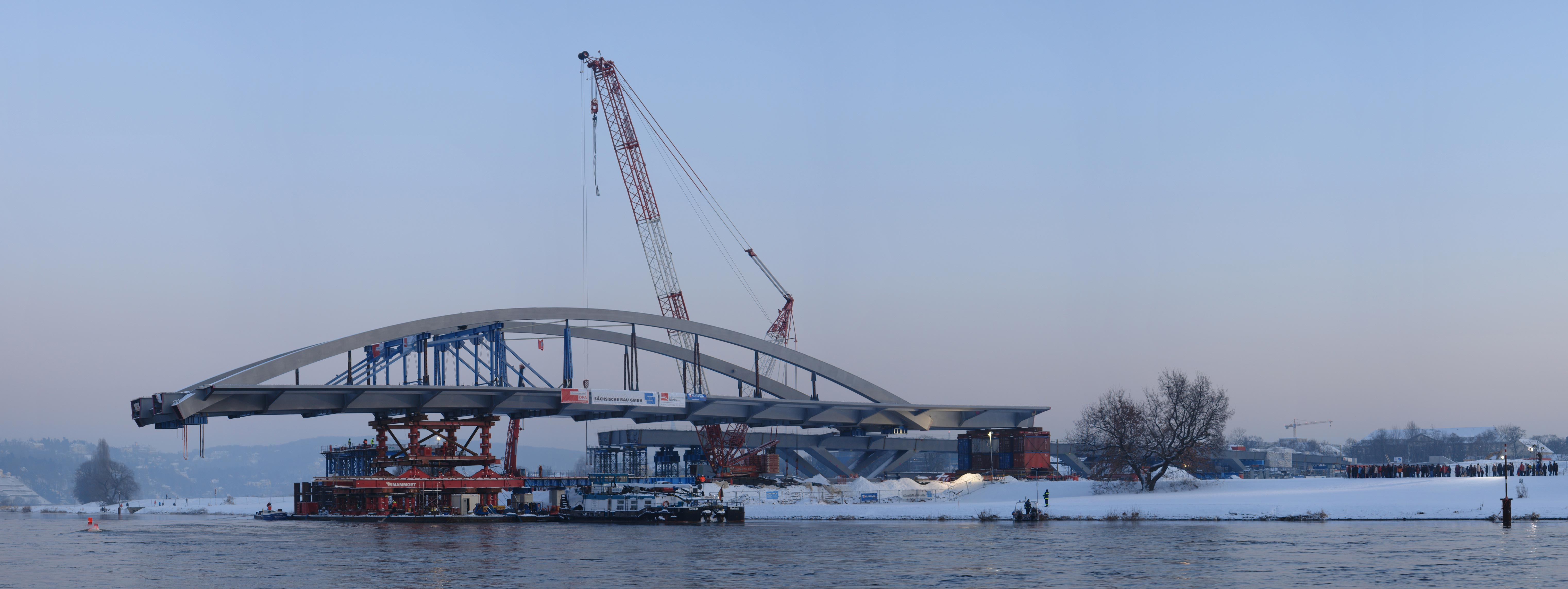 Waldschlößchenbrücke in Dresden auf den Pontons vor dem Einschwimmen